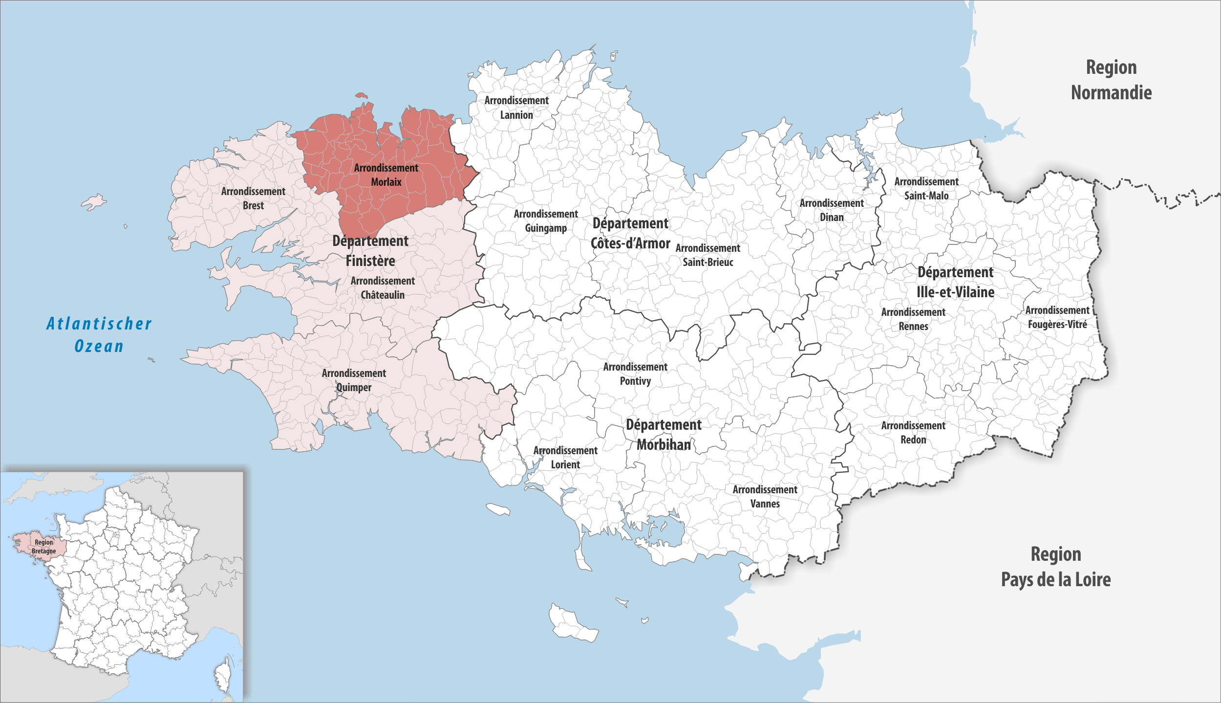 Lage des Arrondissements Morlaix